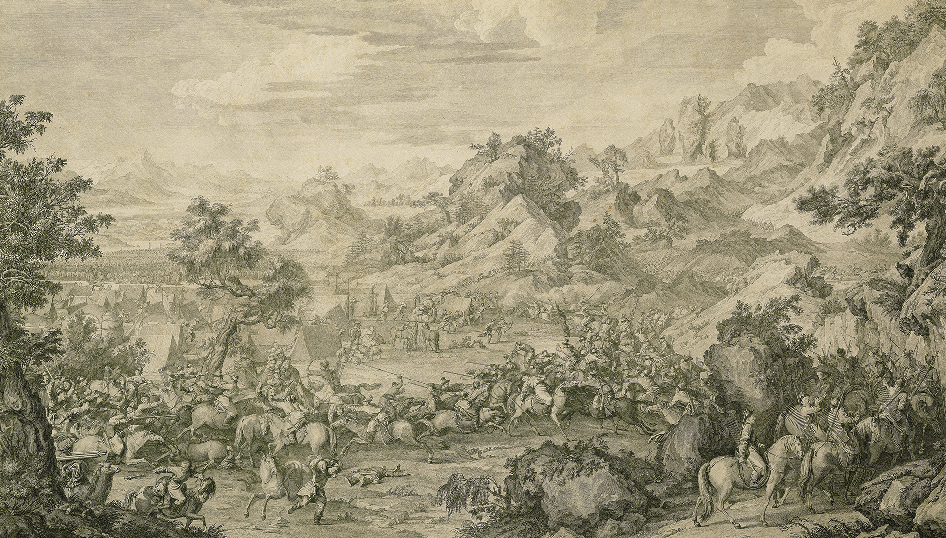 又稱〈愛玉史詐營圖〉